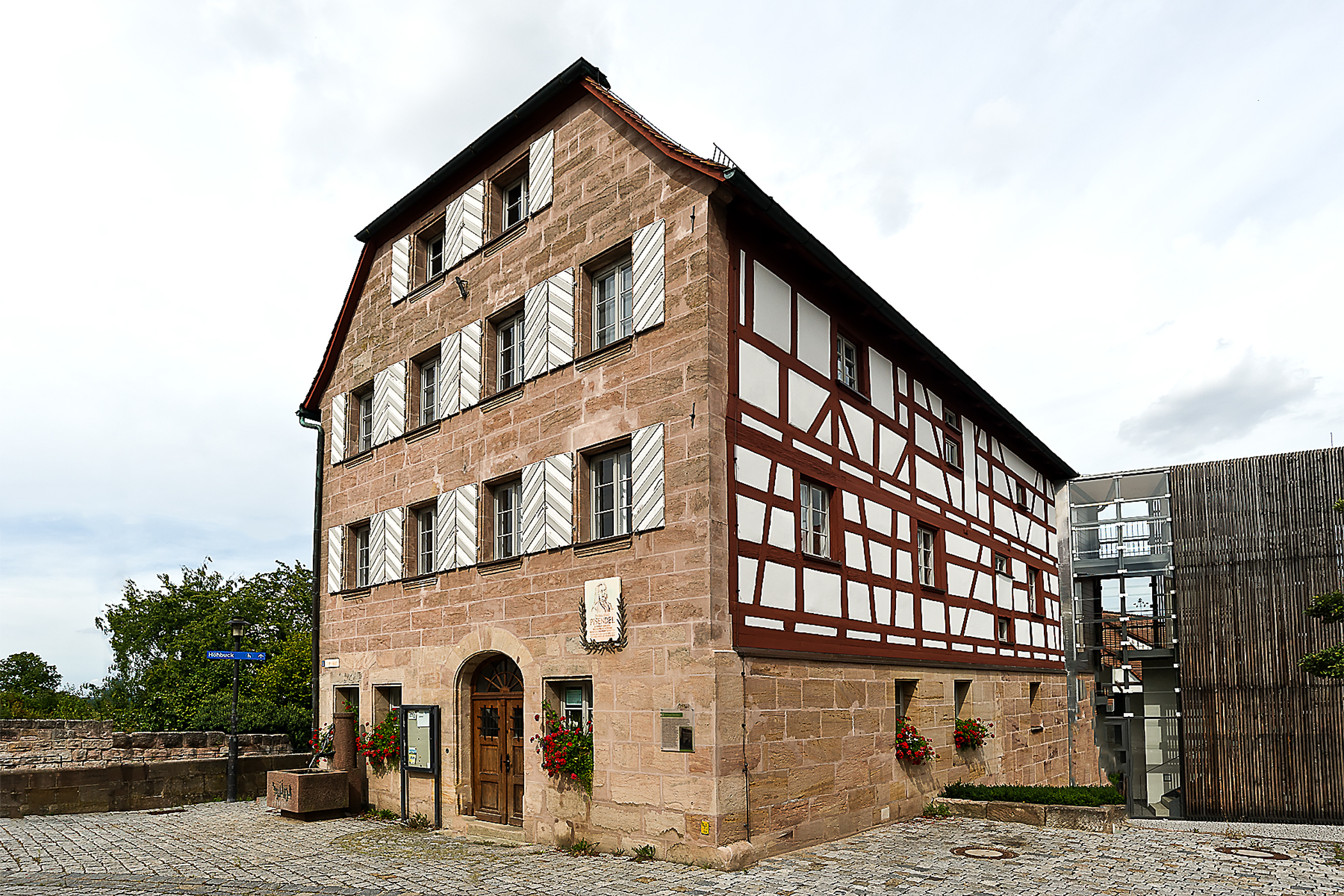 Dreigeschossiges Satteldachhaus am Steilabfall zum Burggraben, Westgiebel mit Halbwalm, Sockel- und Erdgeschoss sowie Westgiebel aus Sandsteinquadermauerwerk, Obergeschosse und Ostgiebel freiliegendes Fachwerk, 1670–74 mit Erneuerungen von 1893 This is a photograph of an architectural monument.